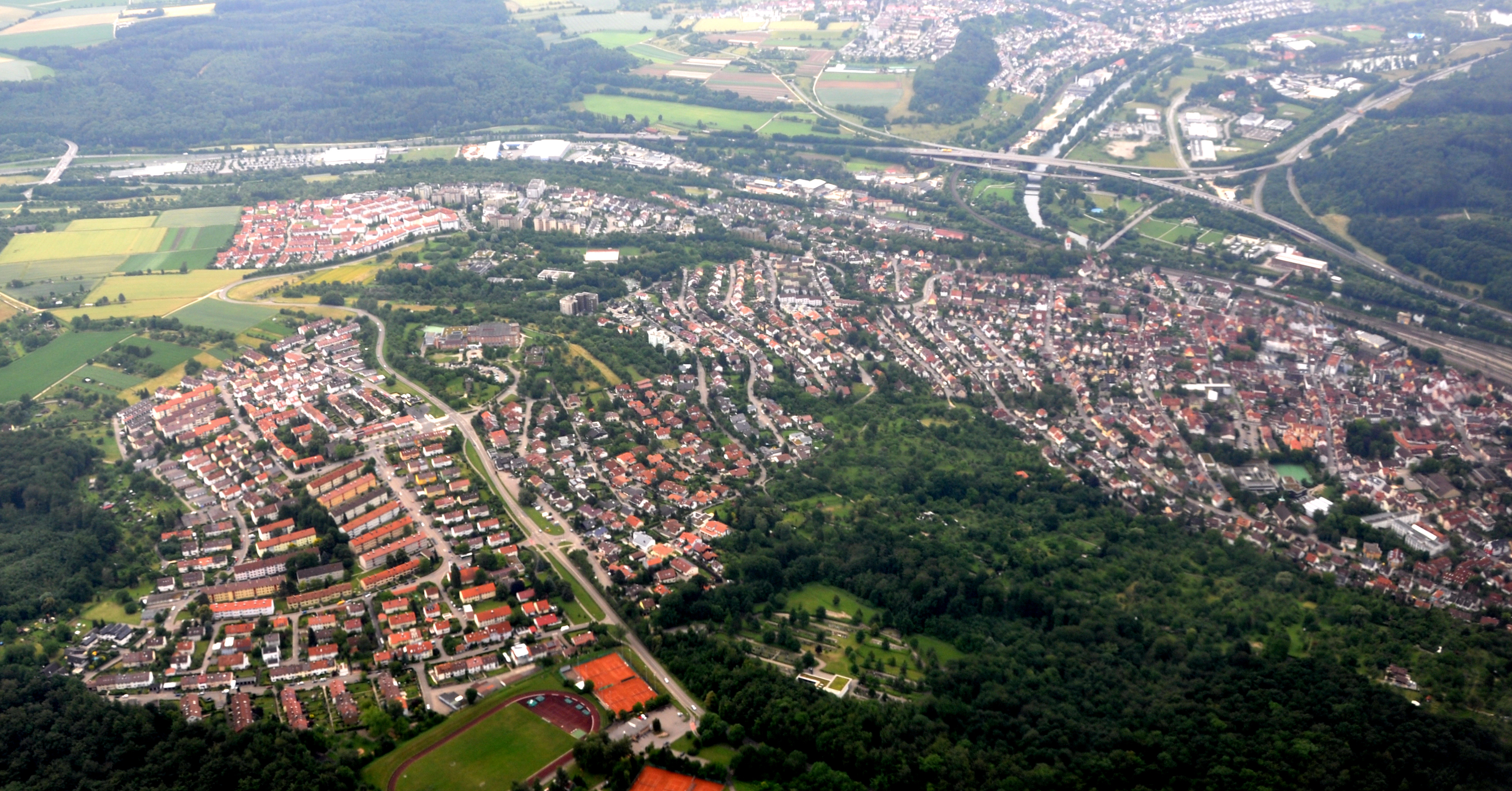 Plochingen, Luftbild